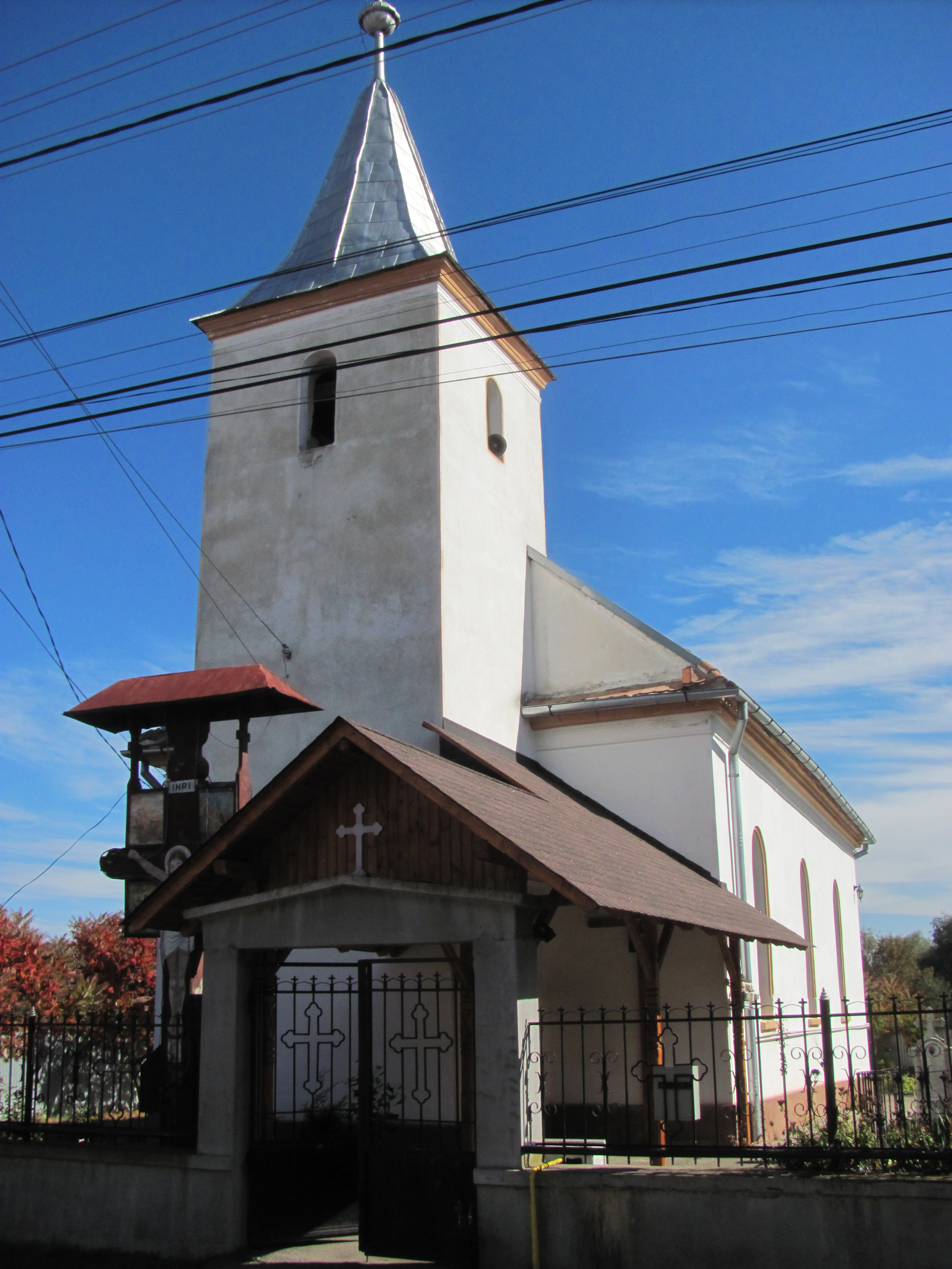 Biserica din Jos - Satul Râuşor, comuna Mândra, Jud. Braşov